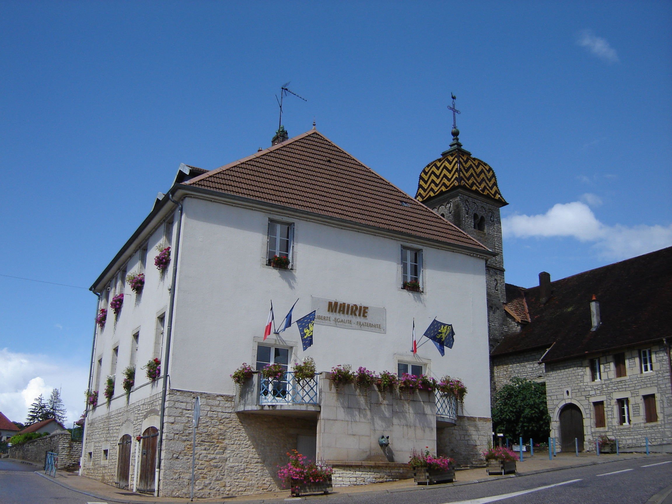 La Mairie de Boussières et le clocher de l'église derrière elle, 8 août 2008